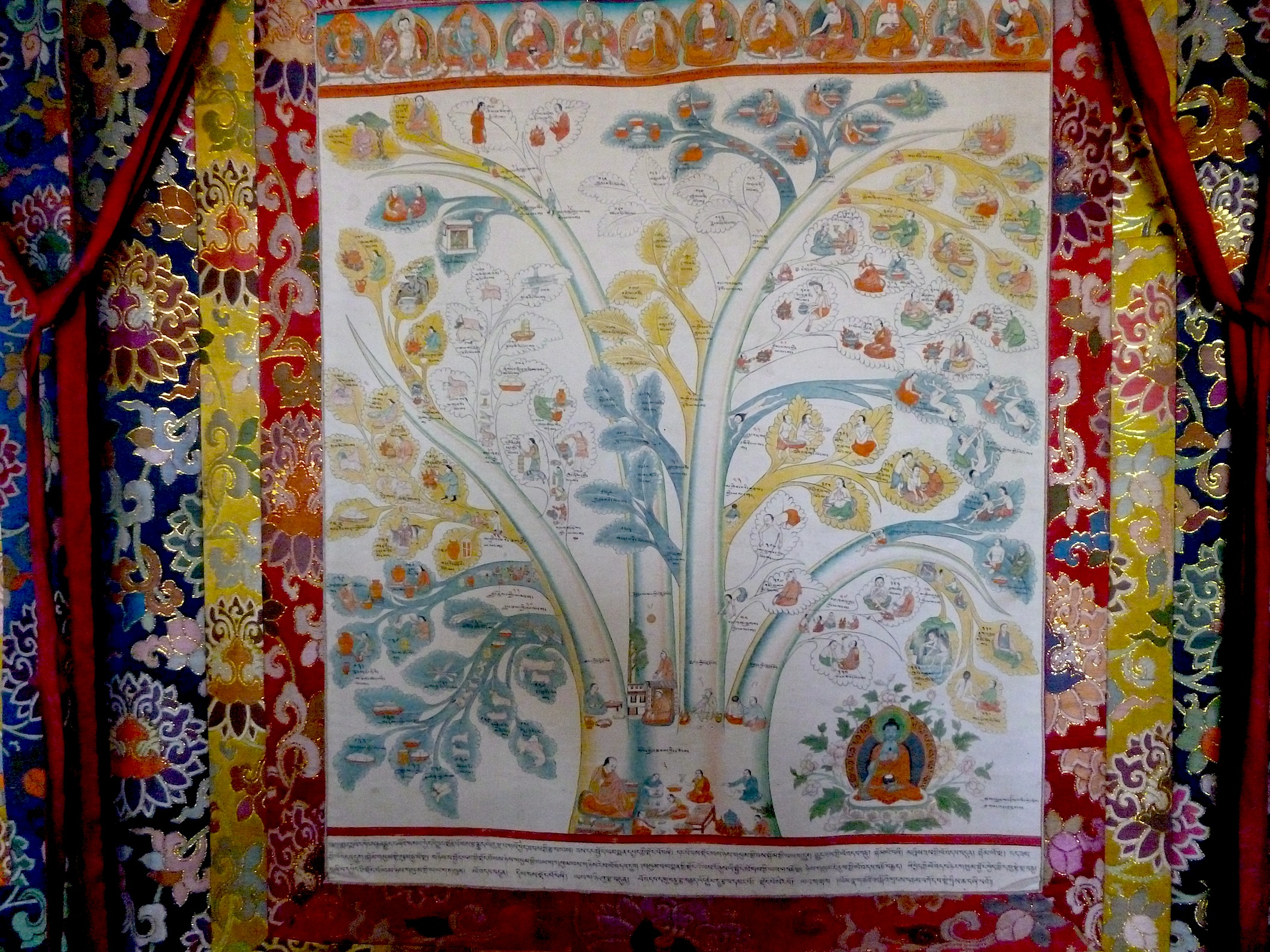 Tibetisches Medizin-Schaubild, Baum zur Diagnose und Behandlung